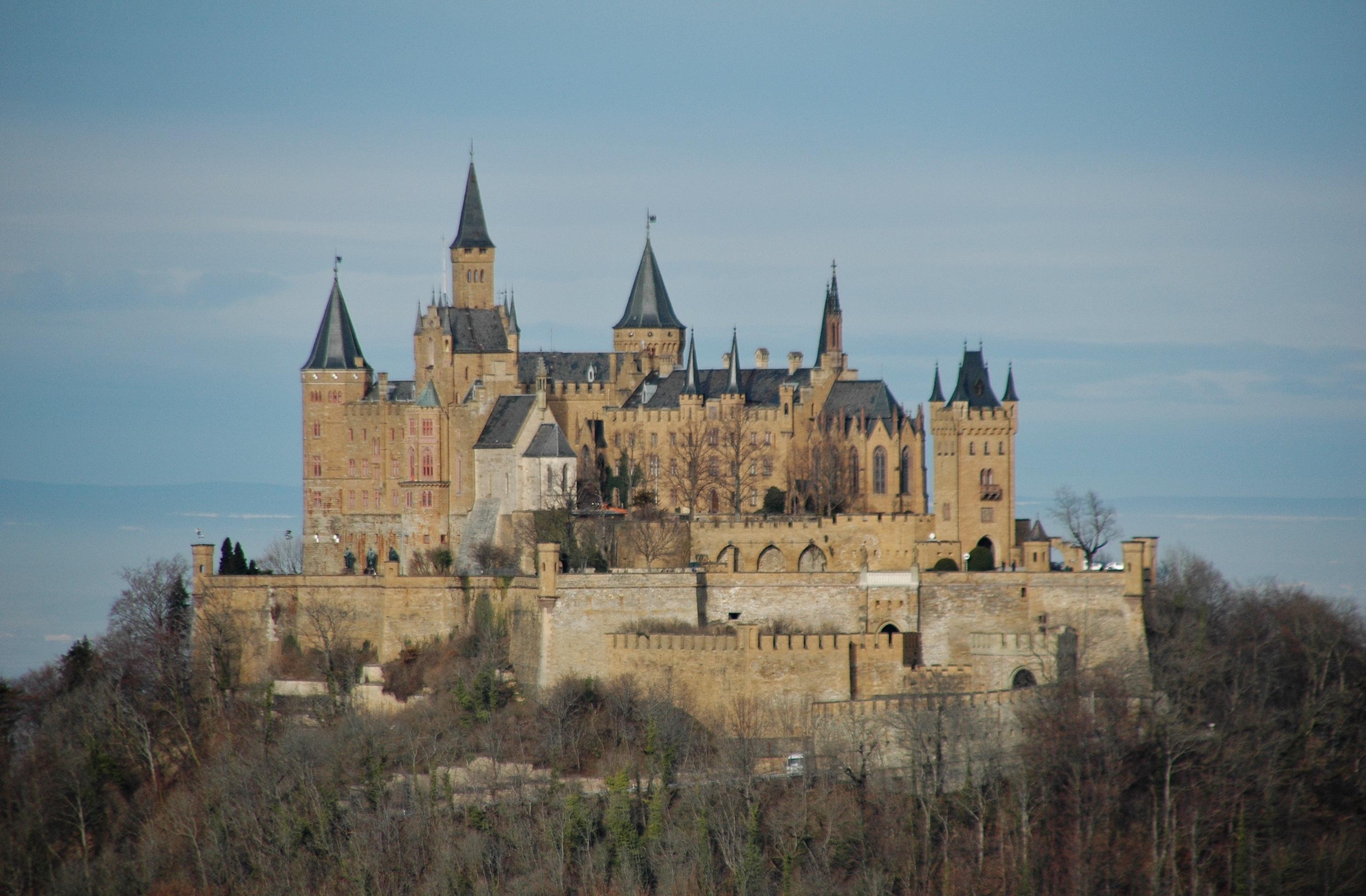 Burg Hohenzollern (1. Burg: 1000-1267 & 3. Burg 1850/1867)